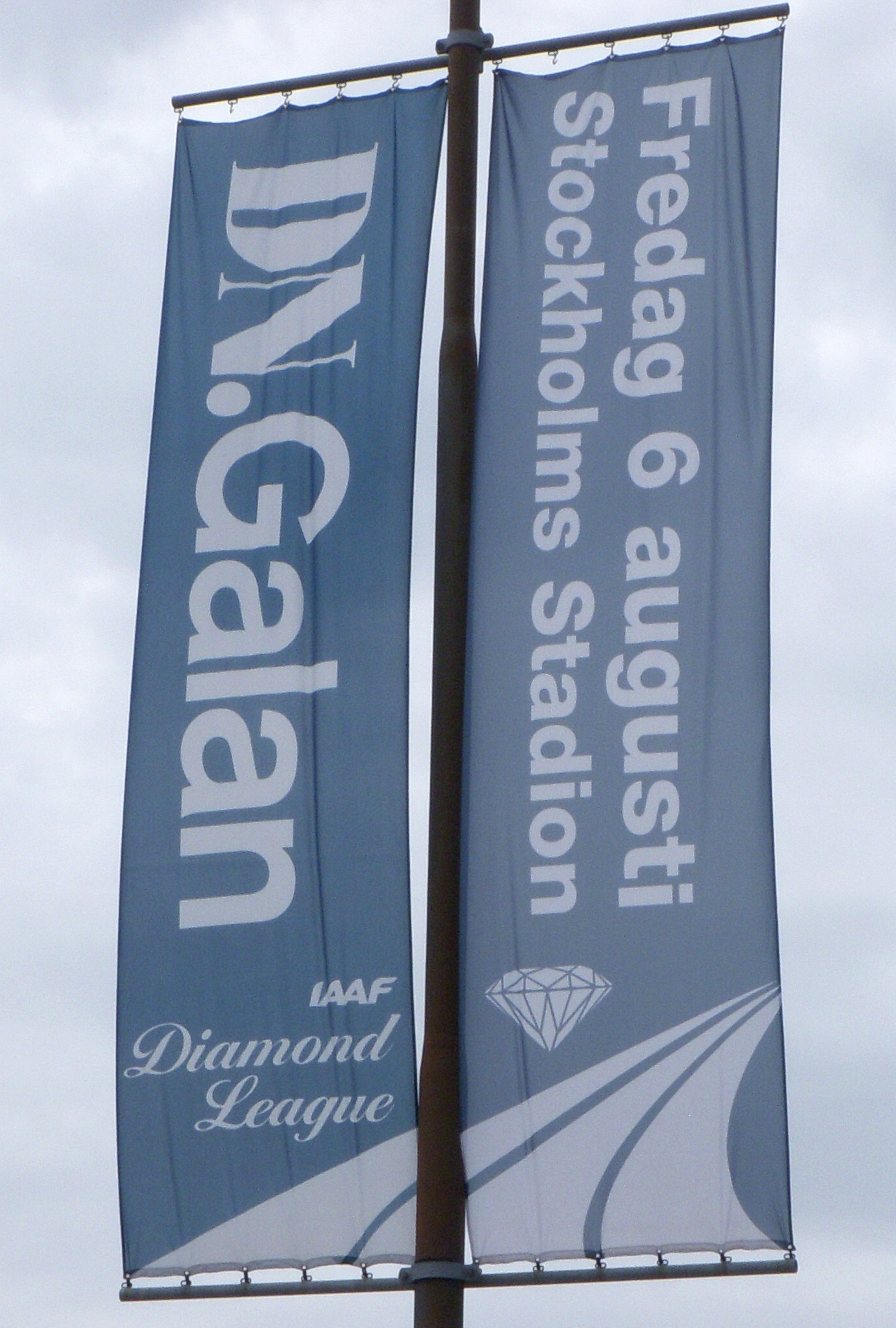 Flagga DN-Galan i Stockholm